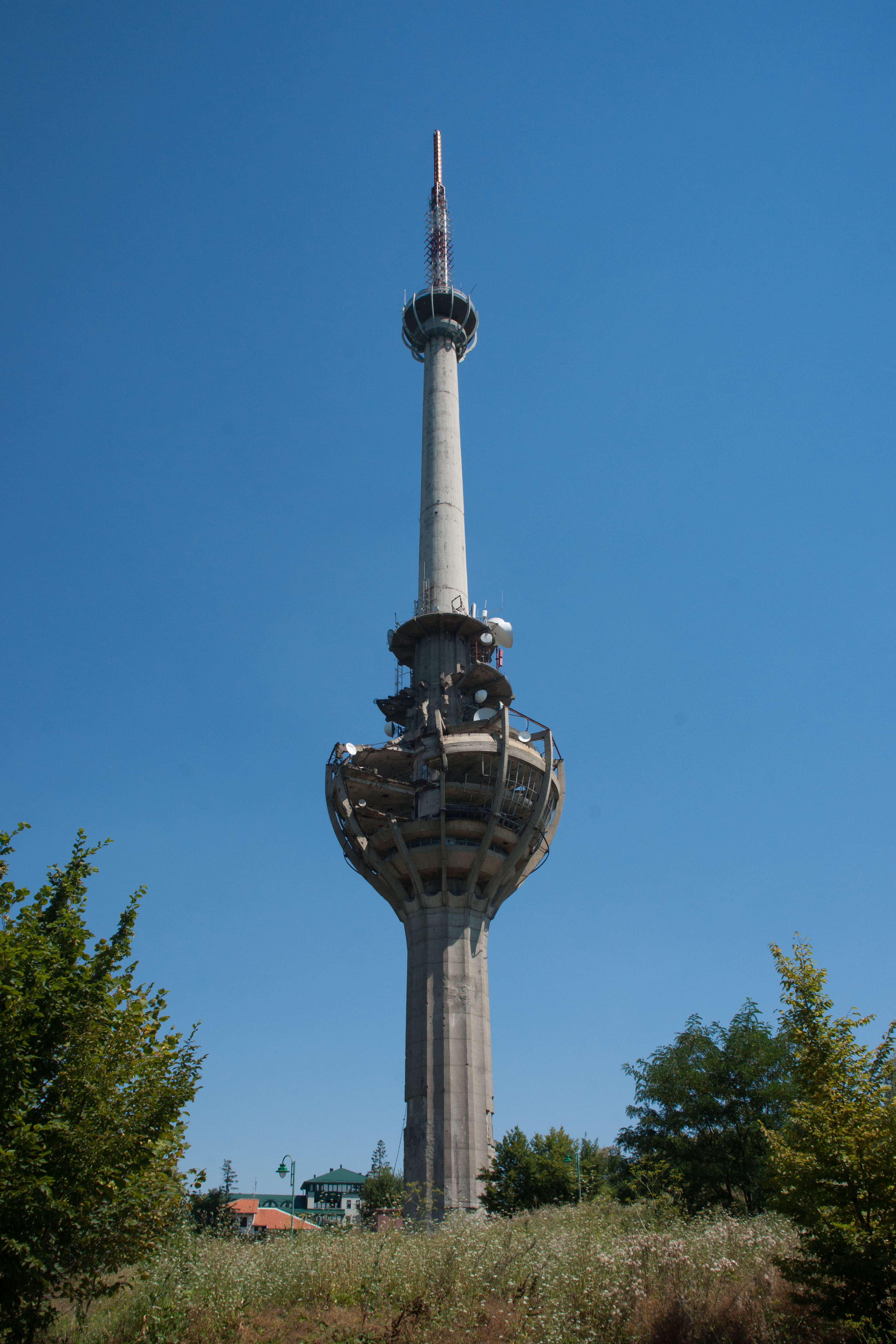 Iriški Venac TV tower